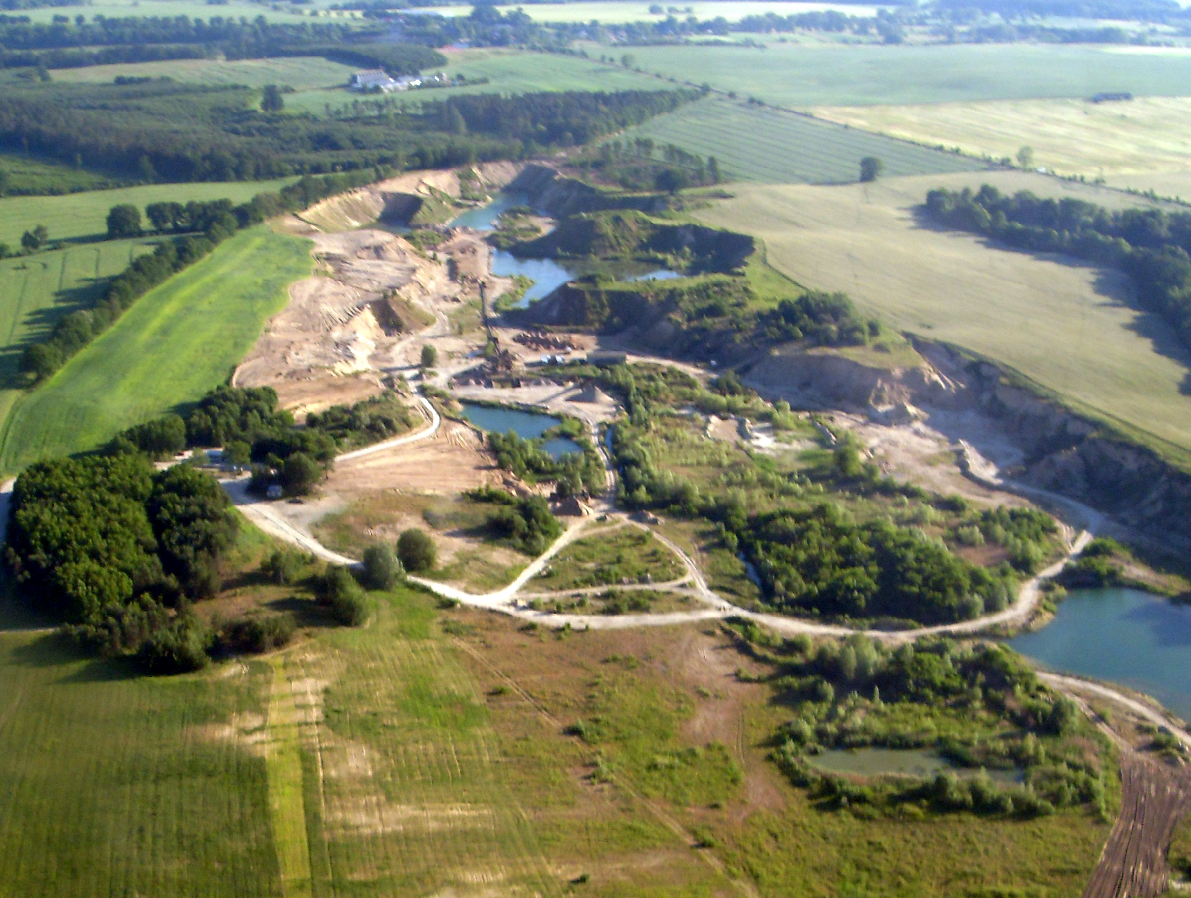 Żwirownia i piaskownia na wschód od wsi Mosty (województwo zachodniopomorskie) z lotu ptaka.